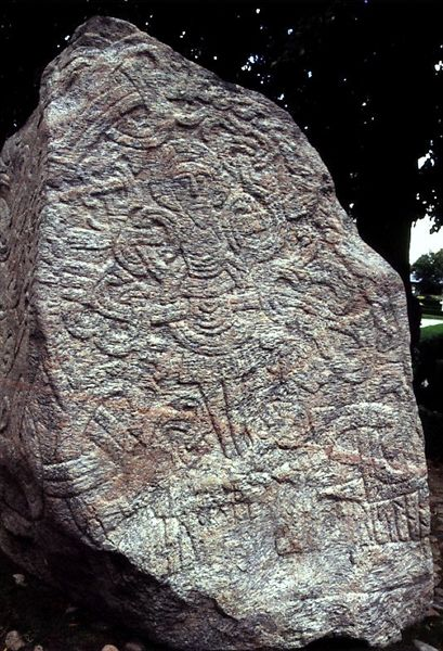 Jelling Kirke i Danmark. Den store Jellingsten